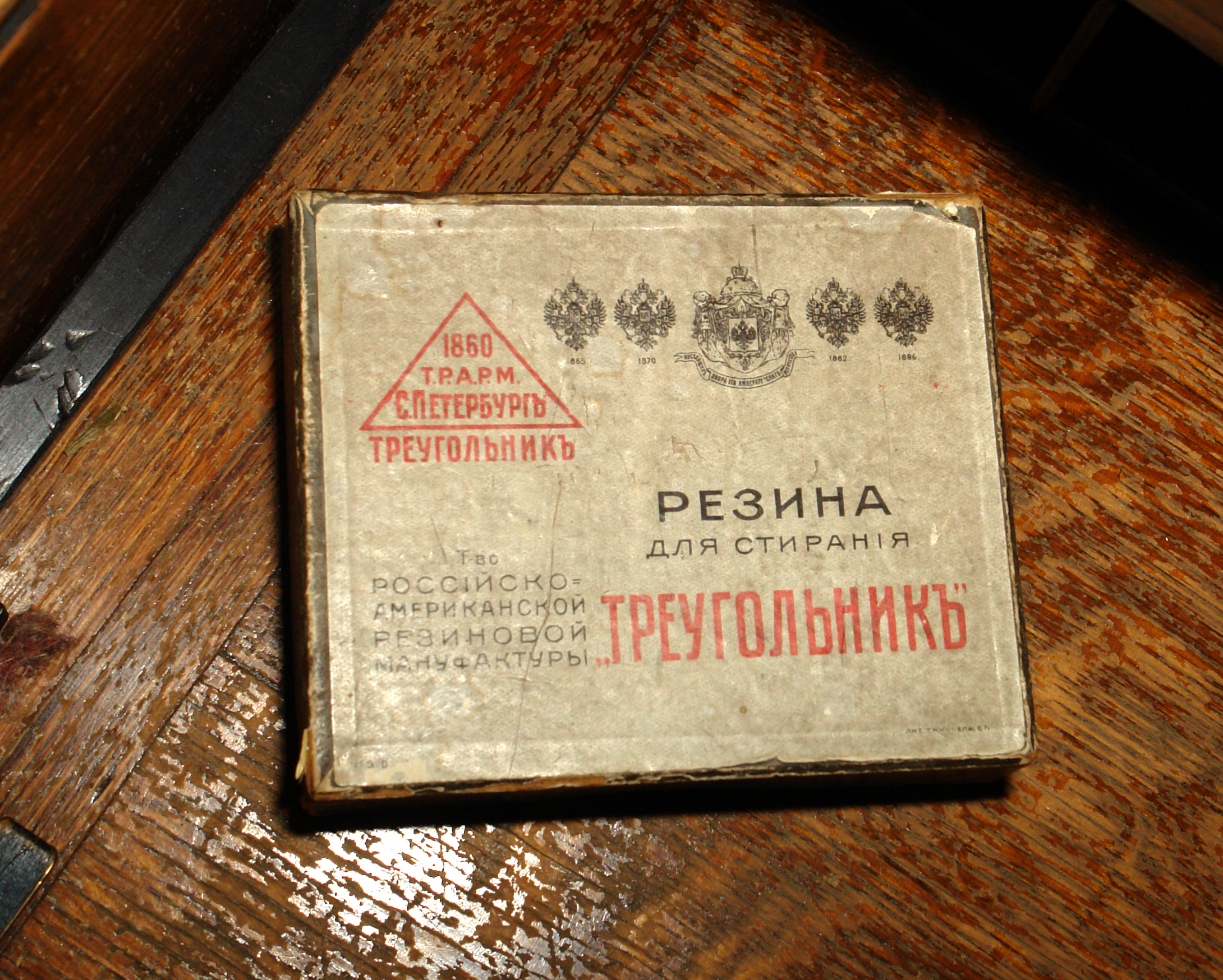 Резина для стирания, XIX век (упаковка). Музей печати, Санкт-Петербург